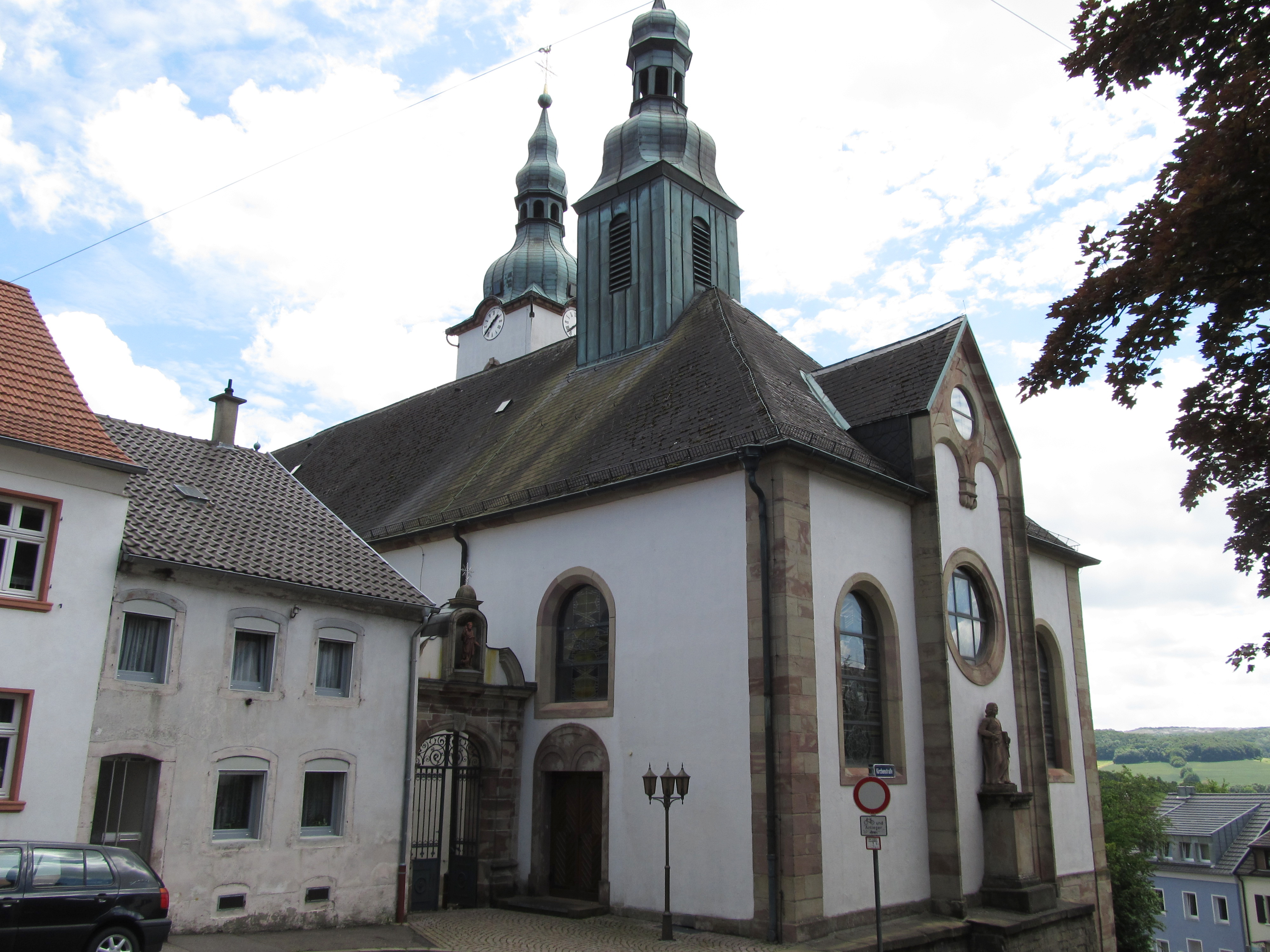 Die St. Peterskirche in Ensheim, Saarland